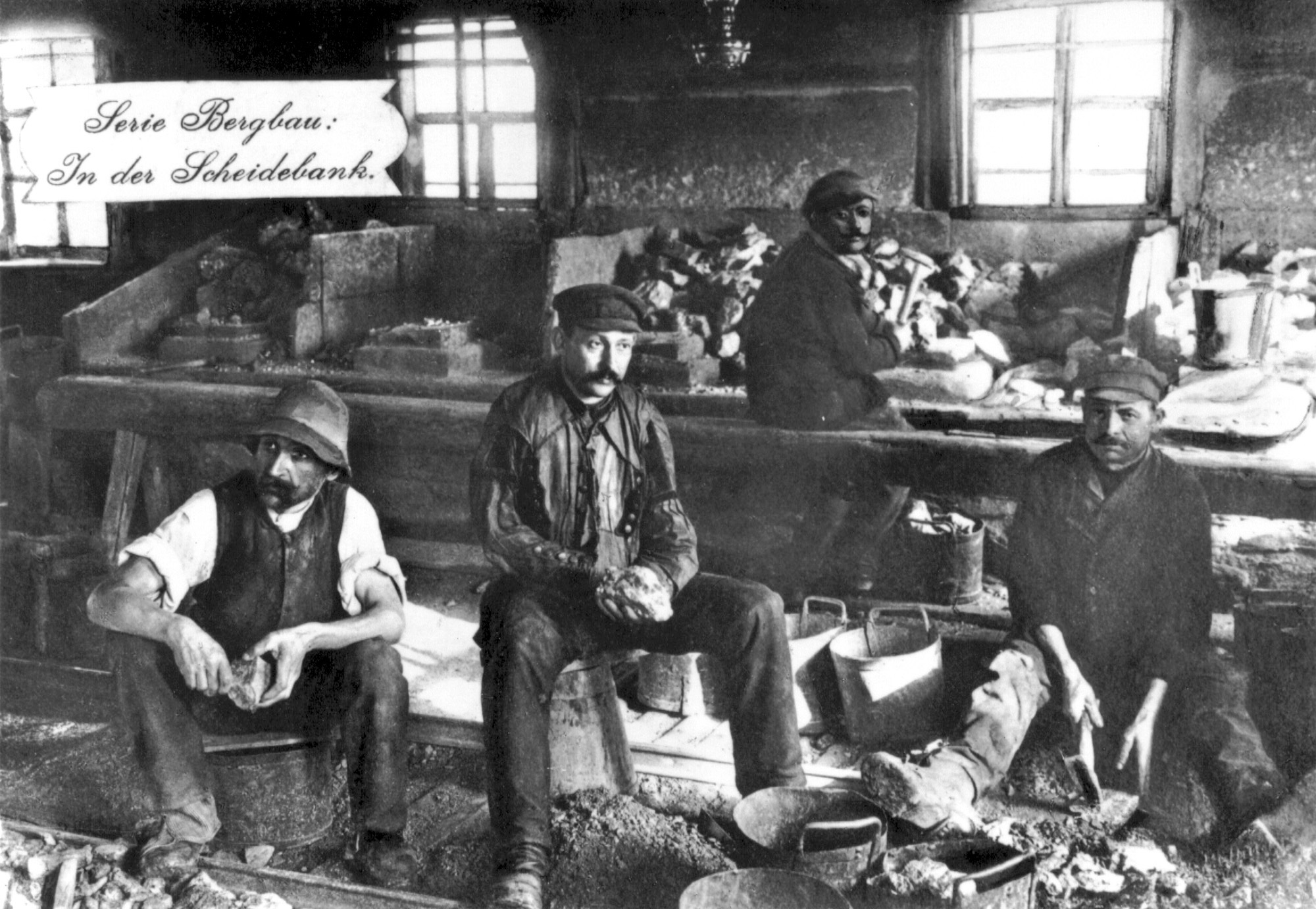 Scheidebank der "Alte-Elisabeth"-Fundgrube in Freiberg. Die Aufnahme kann nicht genau datiert werden, entstand wohl um 1900, kurz vor der Stilllegung der Grube 1913. Wahrscheinlich entstand das Foto in der sog. "Neuen Scheidebank" die als Ersatz für die zur Betstube umgewandelten alten Scheidebank errichtet wurde. Das Gebäude wurde jedoch 1913 abgerissen. Auf dem Bild sind durchweg ältere Bergleute zu sehen. Es ist jedoch bekannt, dass diese Arbeit oft von Kindern oder Jugendlichen verrichtet wurde. Im Hintergrund ist eine lange Bank zu sehen, an der die Arbeit gewöhnlich verrichtet wurde.